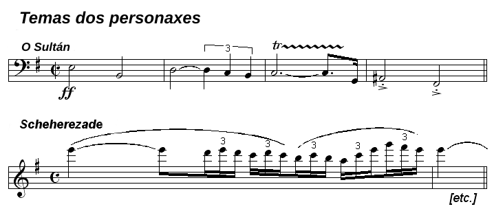 Temas de apertura dos personaxes do Sultán e Scheherezade da obra de Rimsky-Kossakof Scheherezade